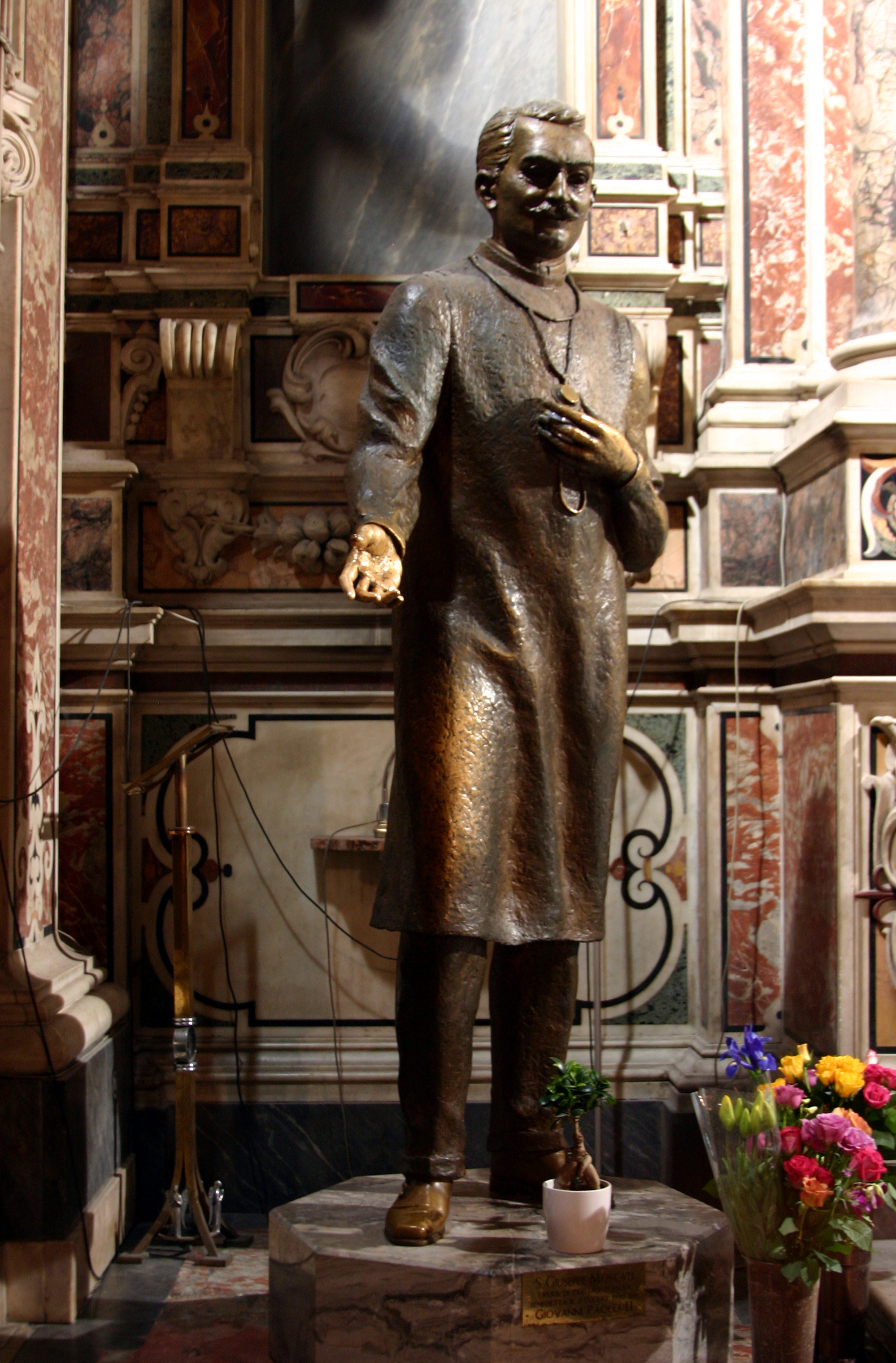 Gesù Nuovo - Naples